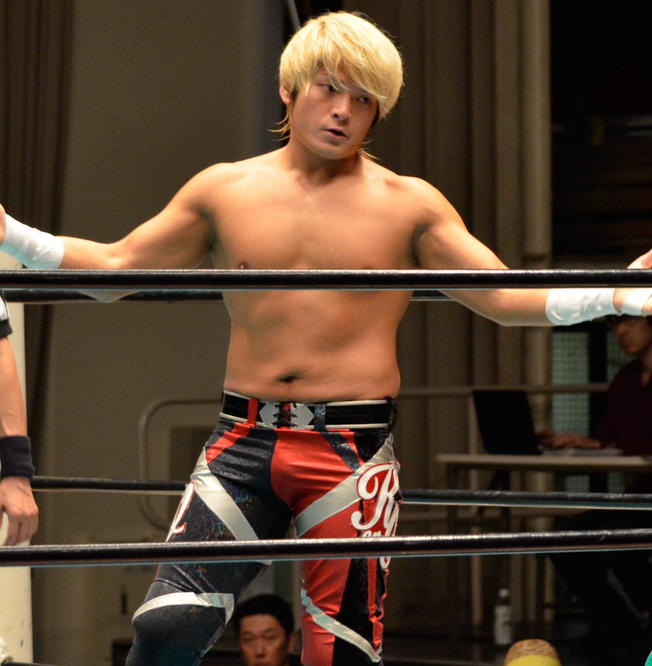 拳王（プロレスラー）